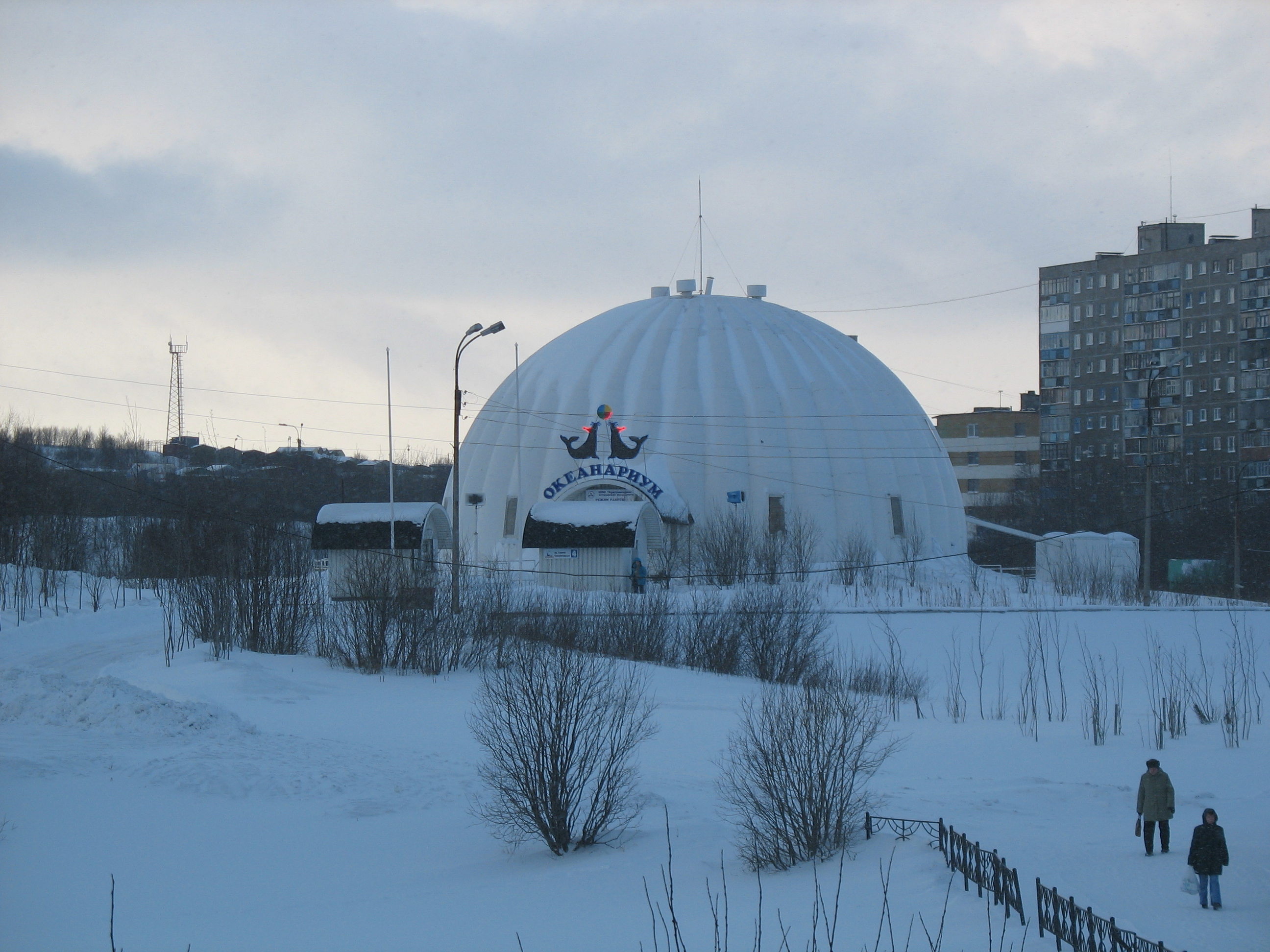 Мурманский океанариум